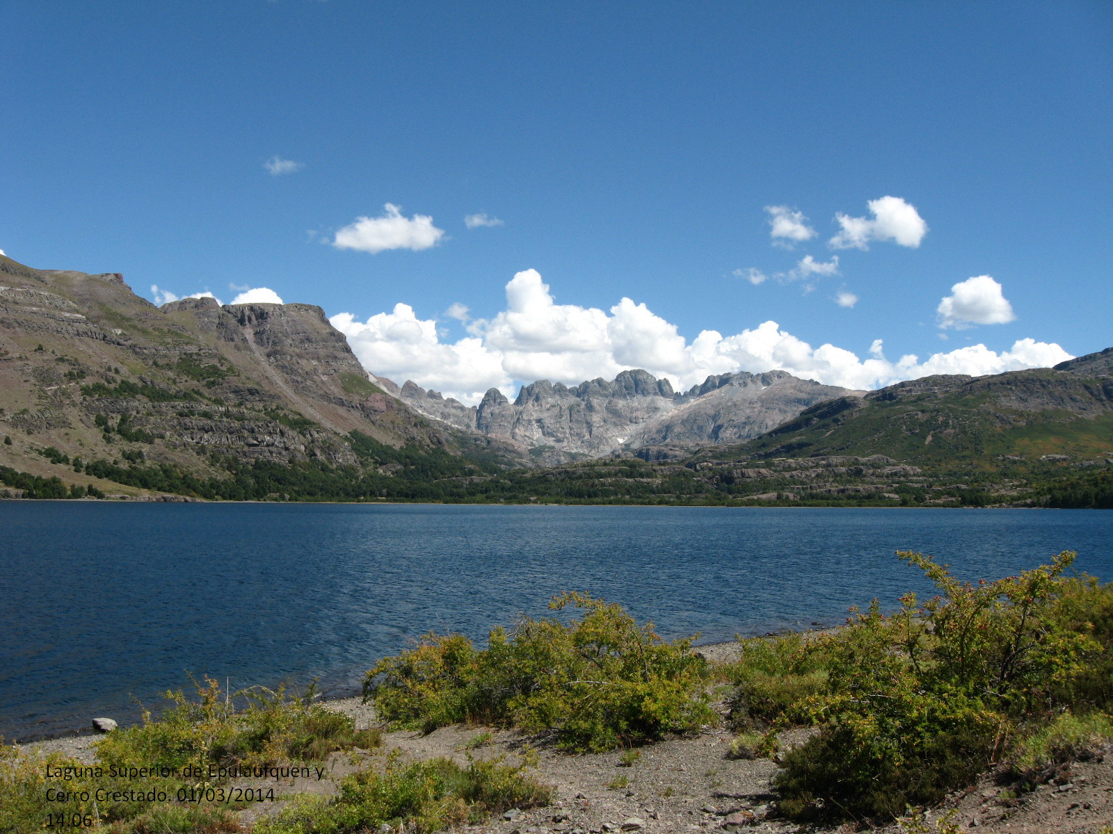 Una de las Lagunas de Epulaufquen, en el noroeste de la provincia de Neuquén en Argentina, tomada a fin de la estación del verano.